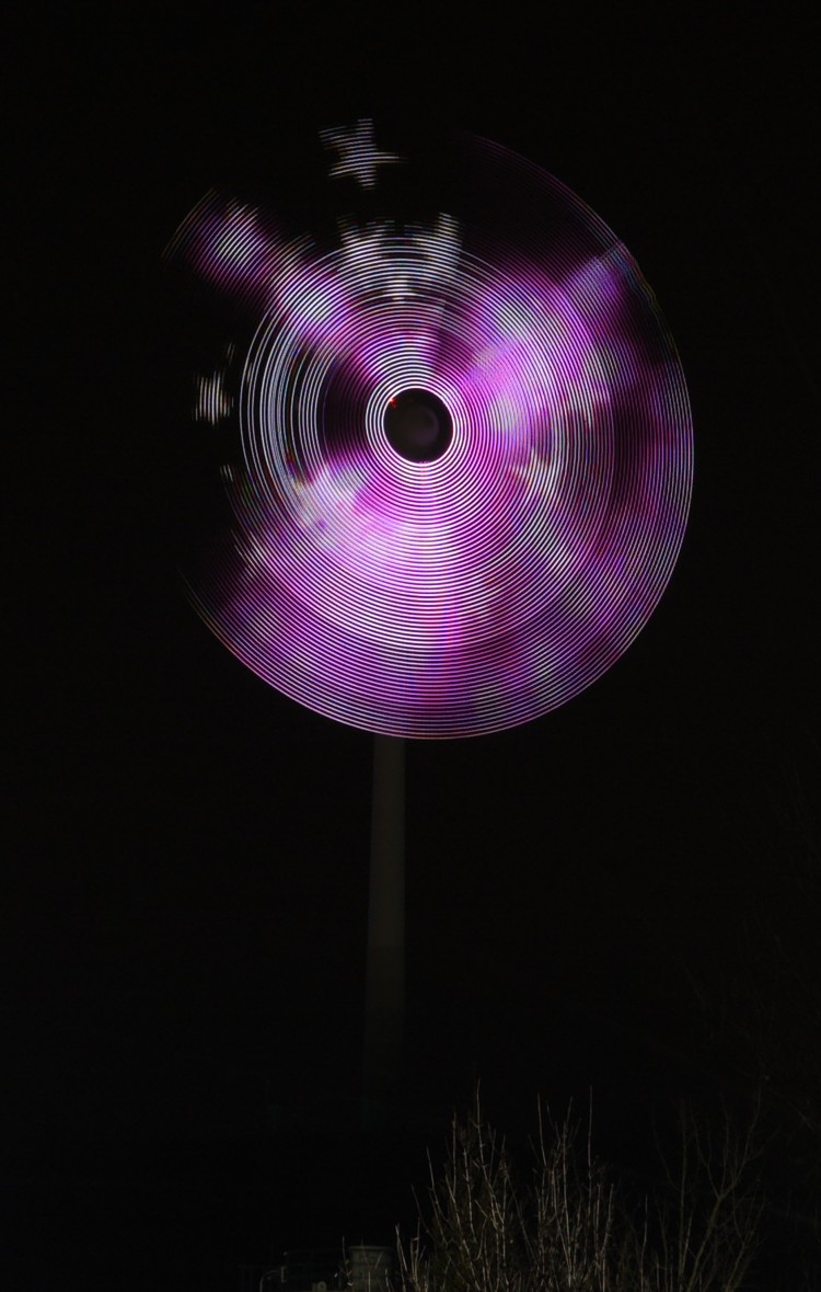 Der "Stern des Südens" in Langzeitaufnahme, die 3 Rotorblätter "verwischen" zu einem mit bloßem Auge nicht erkennbaren Bild